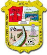 Escudo de Armas de Gustavo Diaz Ordaz Tamaulipas